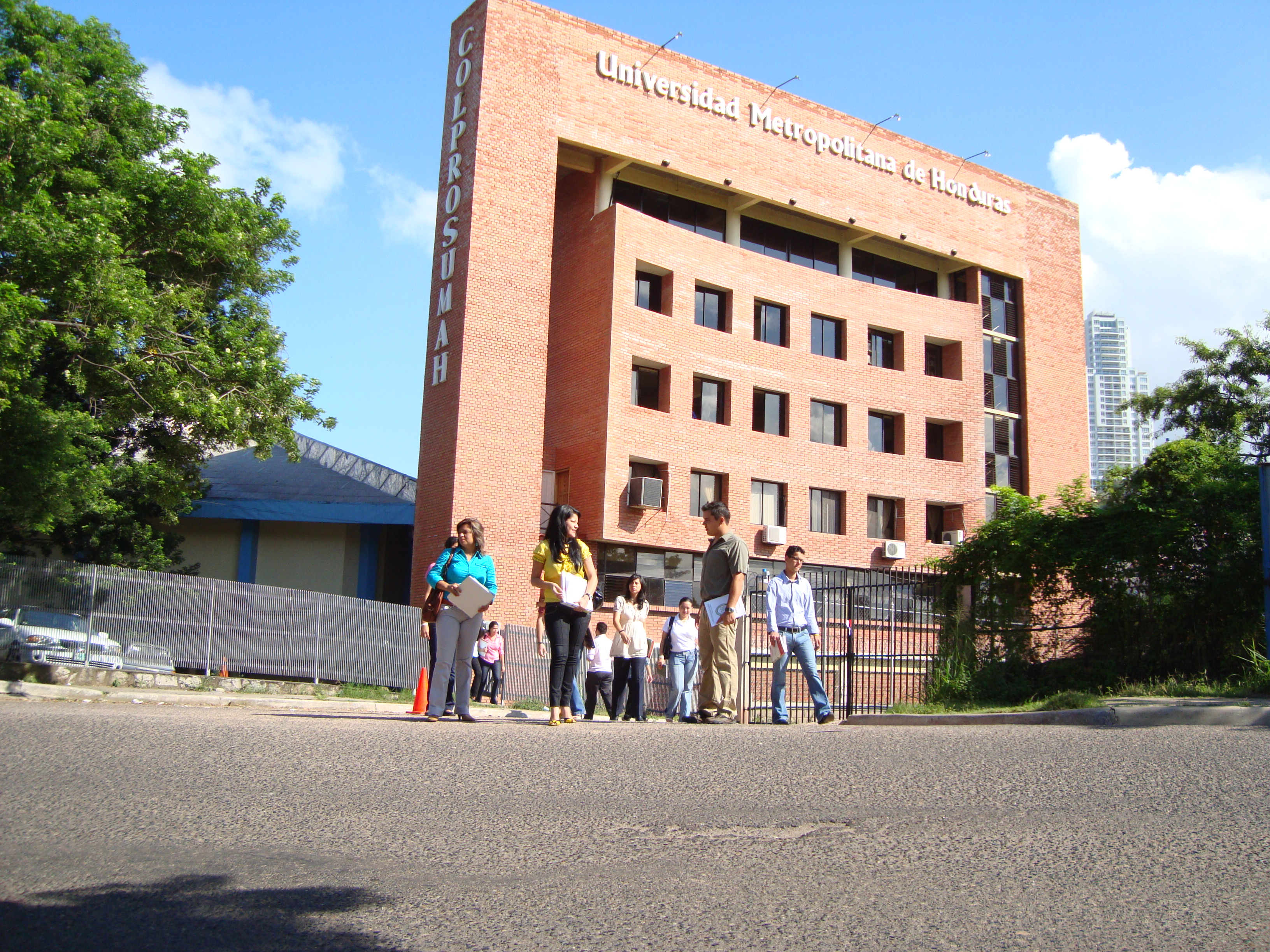 Este es el primer campus de la UMH.